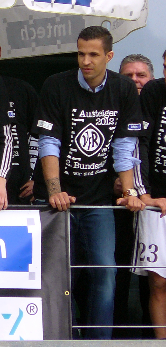 Marcel Klefenz bei der Aufstiegsfeier des VfR Aalen am 5. Mai 2012